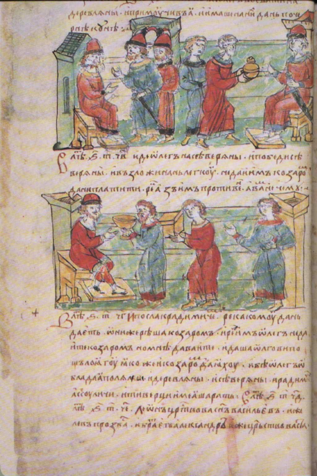 Radzivill chronicle. List 11, back. Вещий Олег собират дань с северян и радимичей.